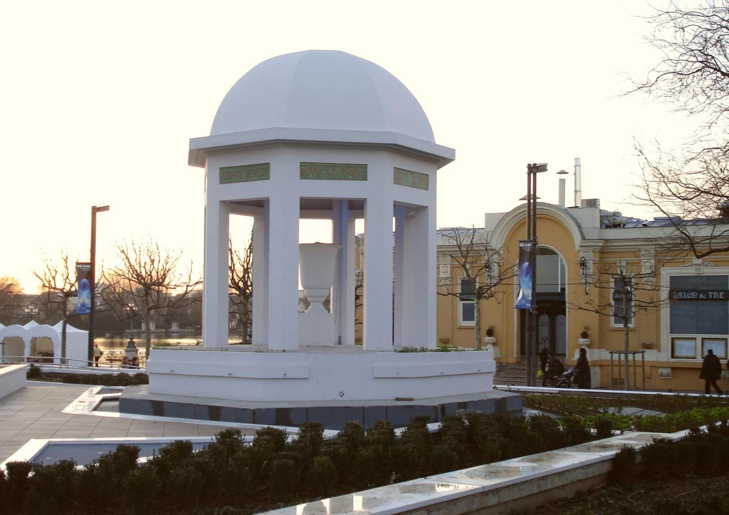 La source du Roy - Enghien-les-Bains (Val-d'Oise, France).